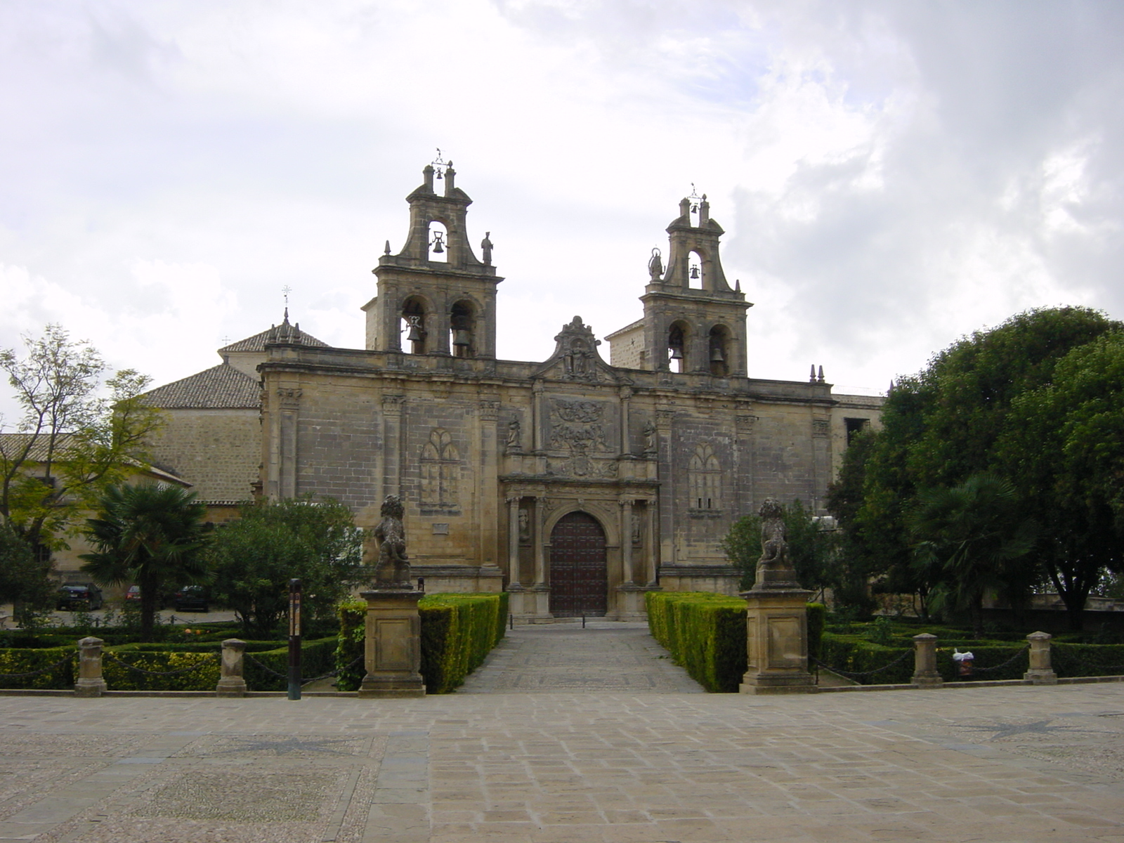 Iglesia de Santa María, en Úbeda (Andalucía)